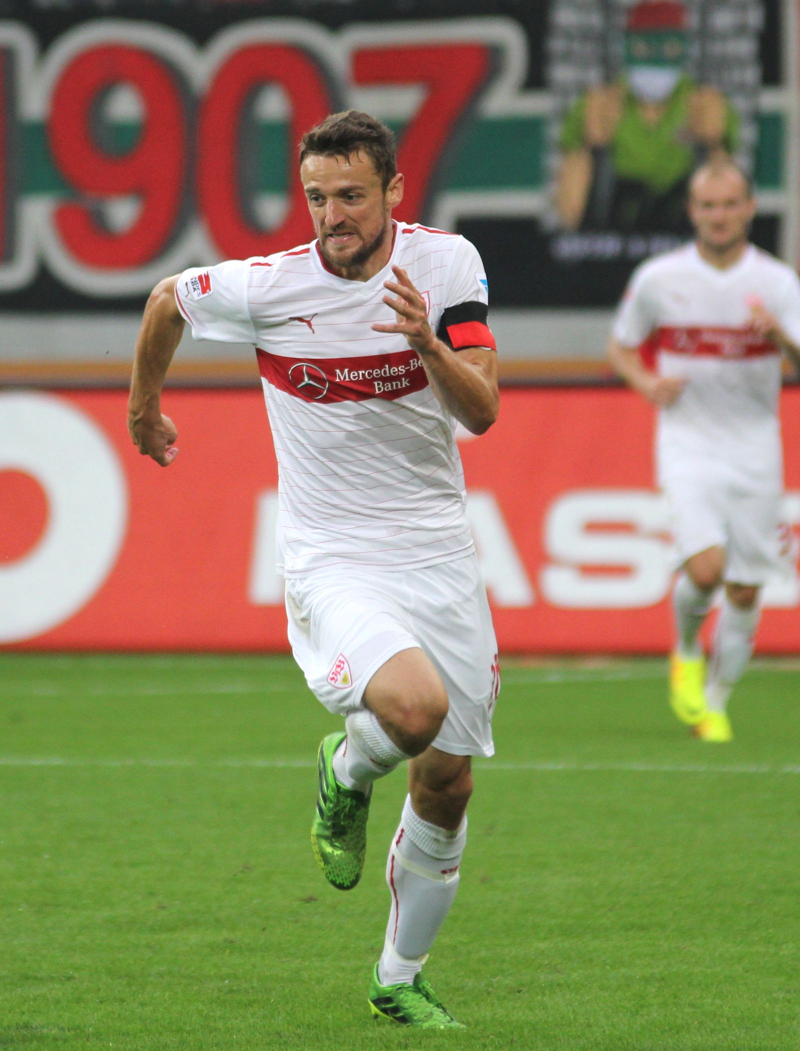 Christian Gentner beim Spiel FC Augsburg gegen VfB Stuttgart am 25.08.2013.